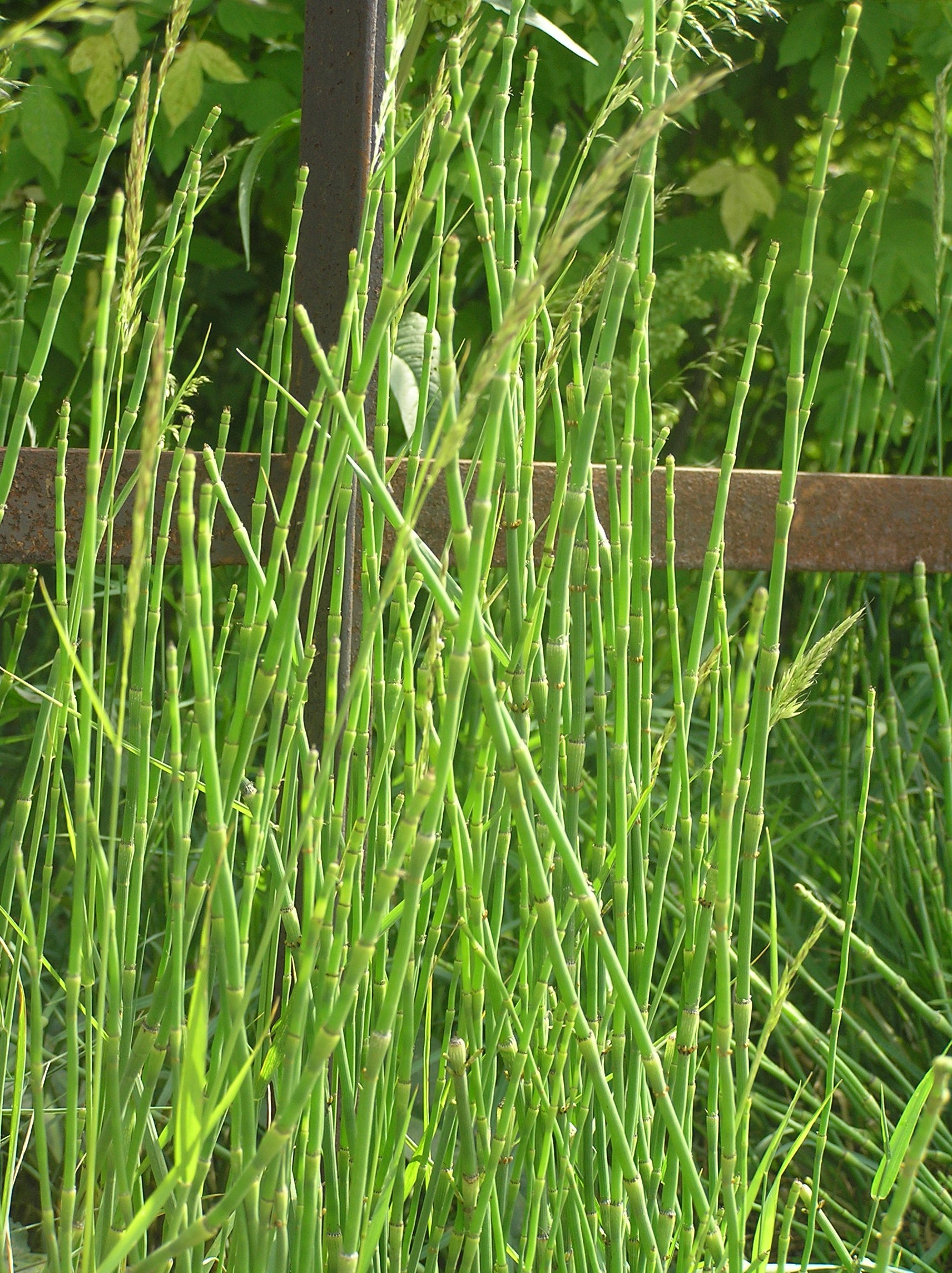 Equisetum × moorei, Brno - Židenice, Czech Republic